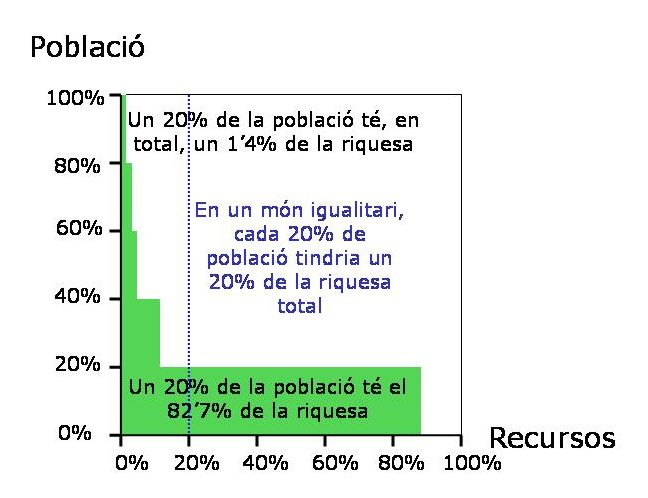 Dades mundials de 1992, segons l'informe anual de la United Nations Development Programm, UNDP (programa de desenvolupament de les Nacions Unides). Una cinquena part de la població mundial viu amb més de quatre cinquenes parts dels recursos mundials.